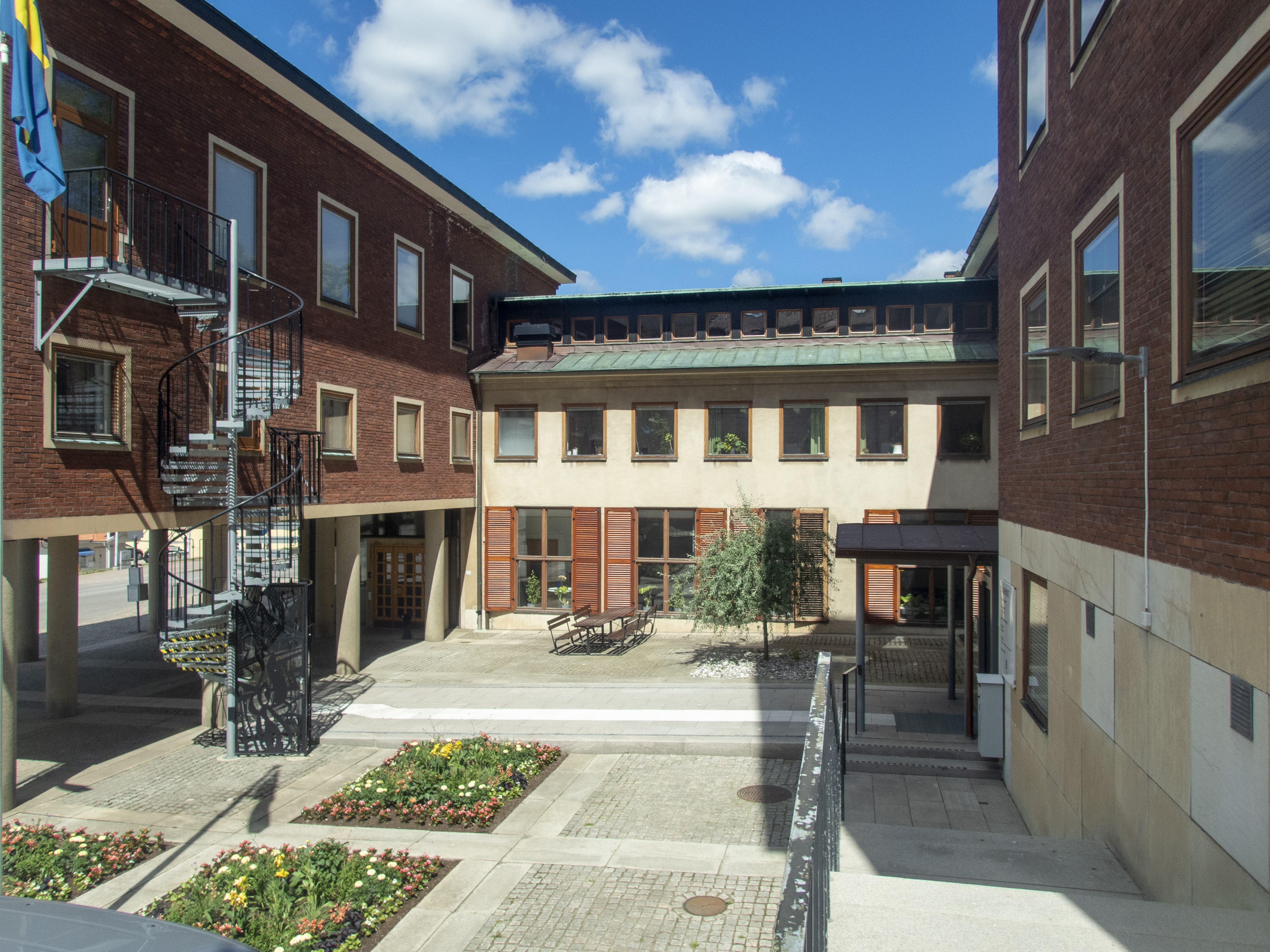 Ulricehamns stadshus. Byggnadsår 1957. Folke Sundberg (Inredningsarkitekt) Sten Gumaelius (Arkitekt) Viking Göransson (Arkitekt)